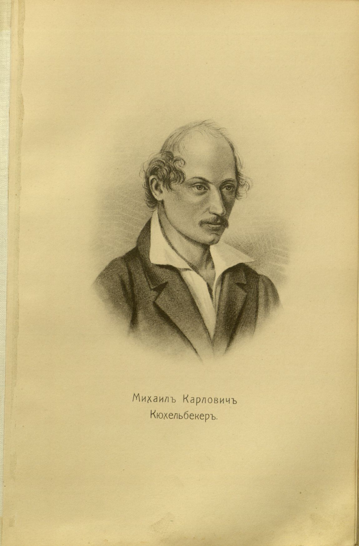 Головачев, П. М. Декабристы : 86 портретов, вид Петровского завода и 2 бытовых рисунка того времени. - М., [1906]